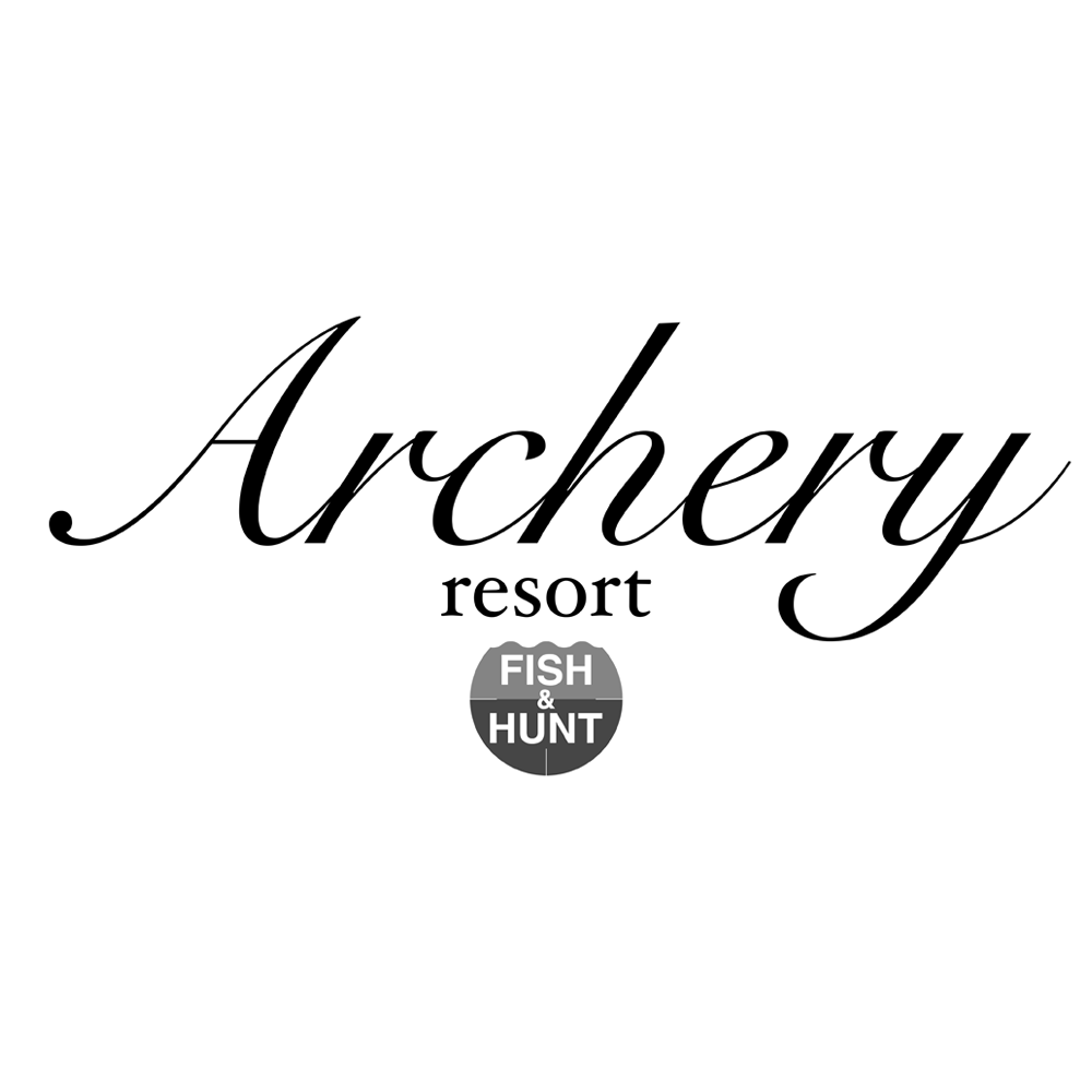 Logo Resortu Archery společnosti FISH&HUNT NOW s.r.o.